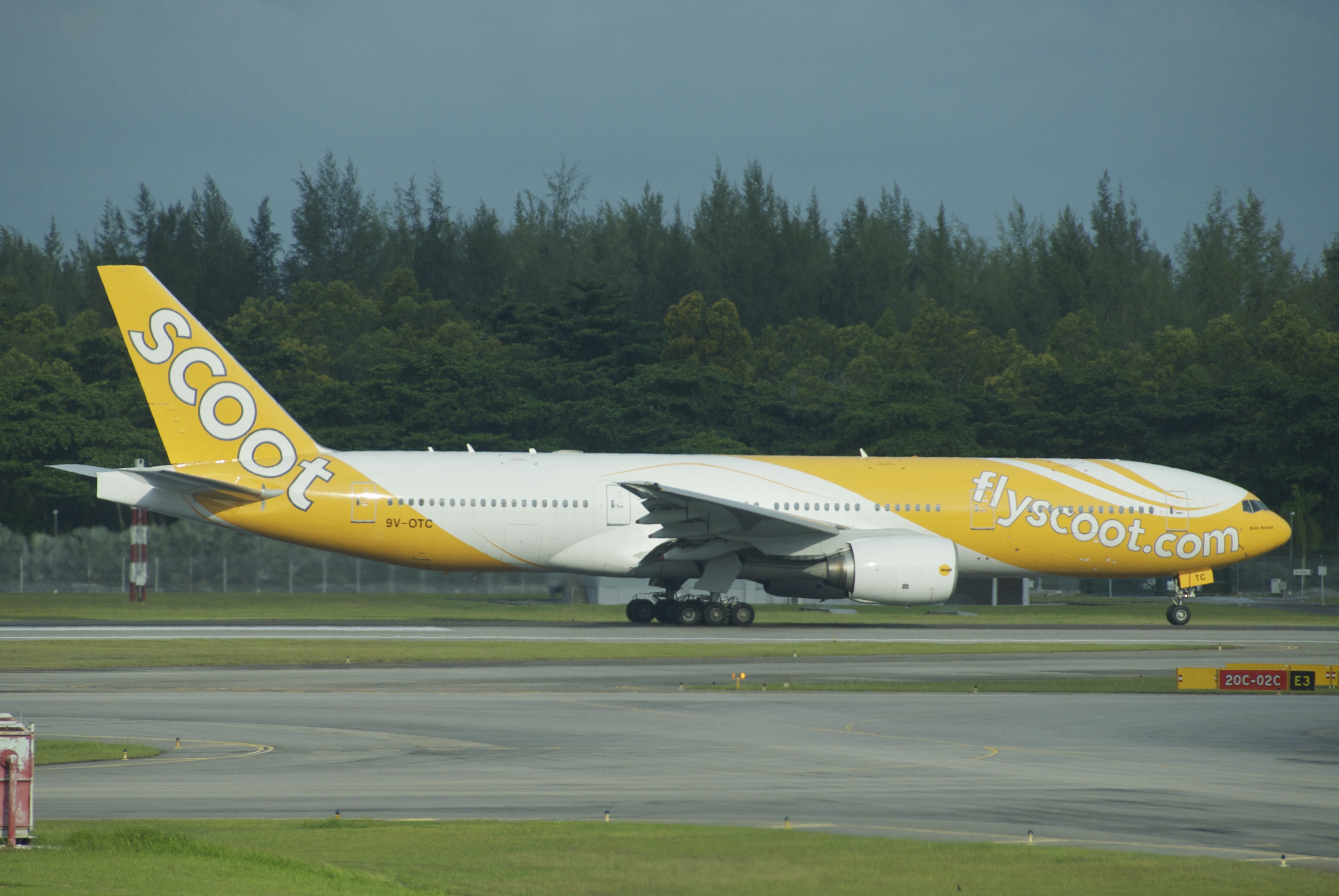 Scoot Boeing 777-212ER; 9V-OTC@SIN;05.07.2012/660bg